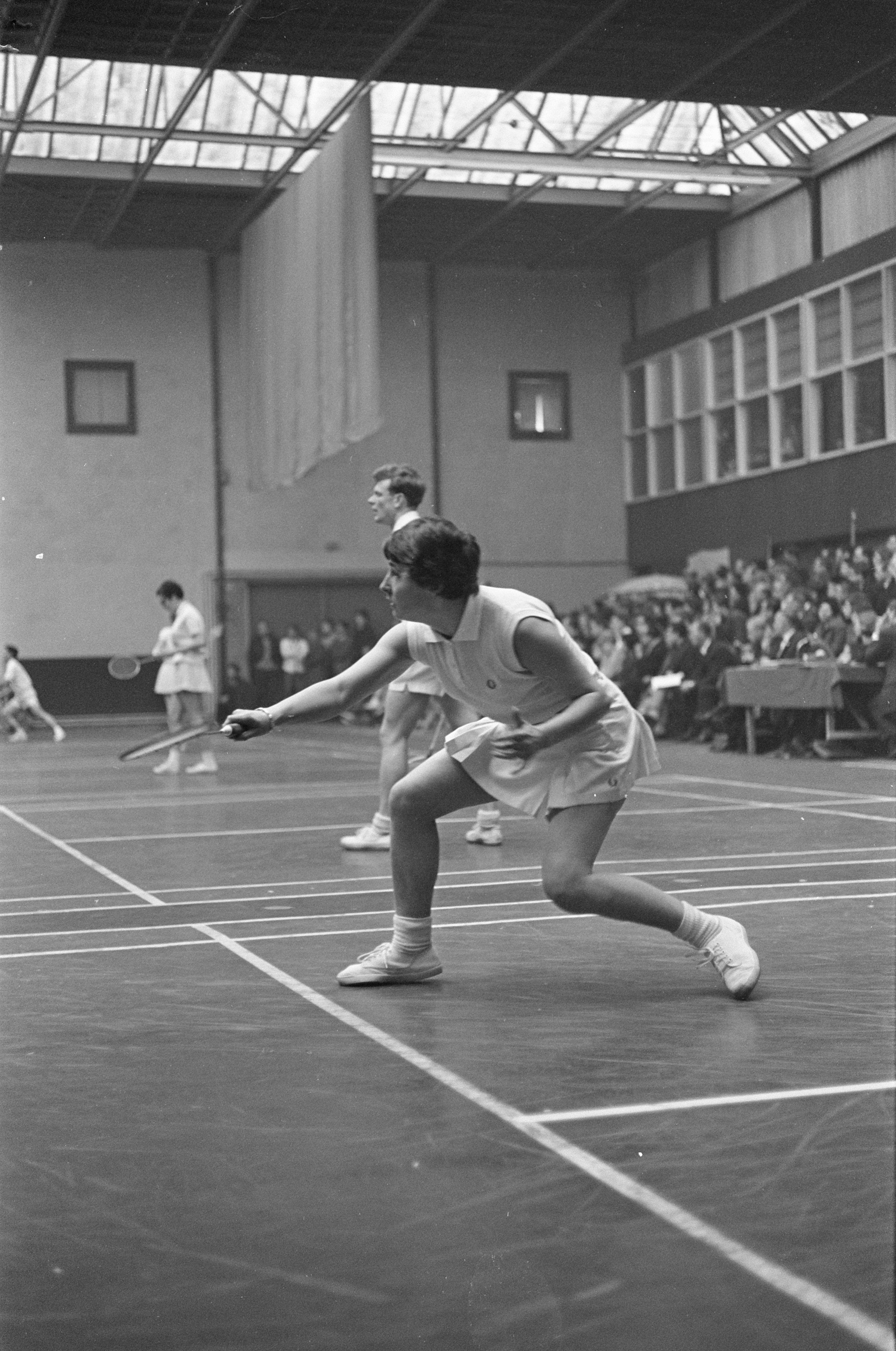 Collectie / Archief : Fotocollectie Anefo Reportage / Serie : [ onbekend ] Beschrijving : Badminton, Internationale kampioenschappen te Haarlem, de Nieuwzeelandse Angela Bairstow in aktie Datum : 10 februari 1968 Locatie : Haarlem Trefwoorden : BADMINTON, KAMPIOENSCHAPPEN Fotograaf : Koch, Eric / Anefo Auteursrechthebbende : Nationaal Archief Materiaalsoort : Negatief (zwart/wit) Nummer archiefinventaris : bekijk toegang 2.24.01.05 Bestanddeelnummer : 921-0630